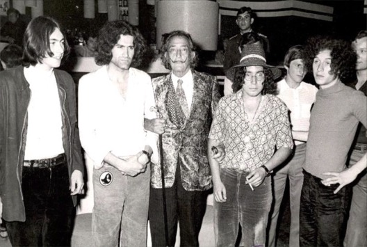 Los componentes del grupo Máquina! junto a Salvador Dalí en una discoteca barcelonesa (1970).